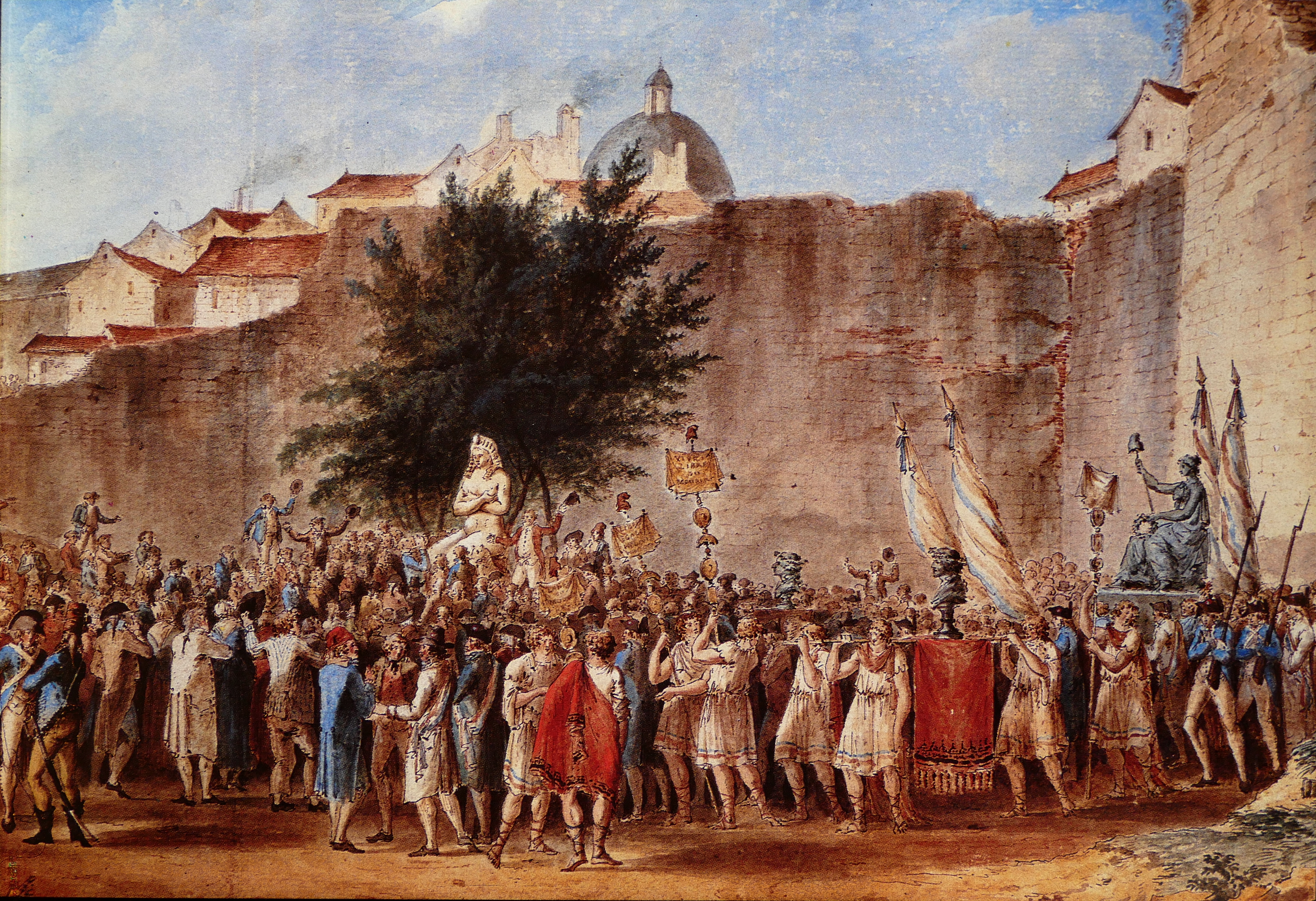 Fête sur les ruines de la Bastille, sans doute la Fête de l'Unité et de l'indivisibilité du 10 août 1793, aquarelle anonyme non datée (vers 1793). Musée Carnavalet.